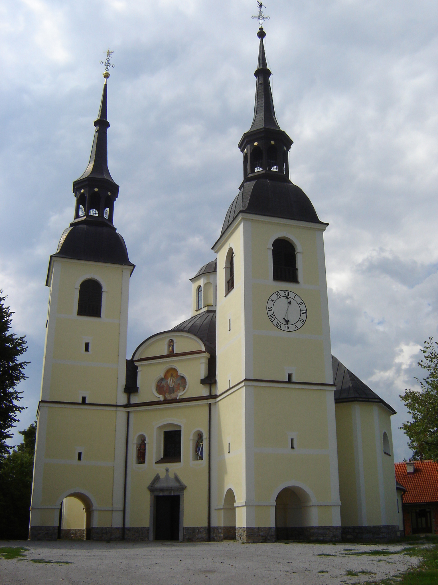 Cerkev sv. Frančiška Ksaverja in Vesela Gora village, Šentrupert municipality, Slovenia.